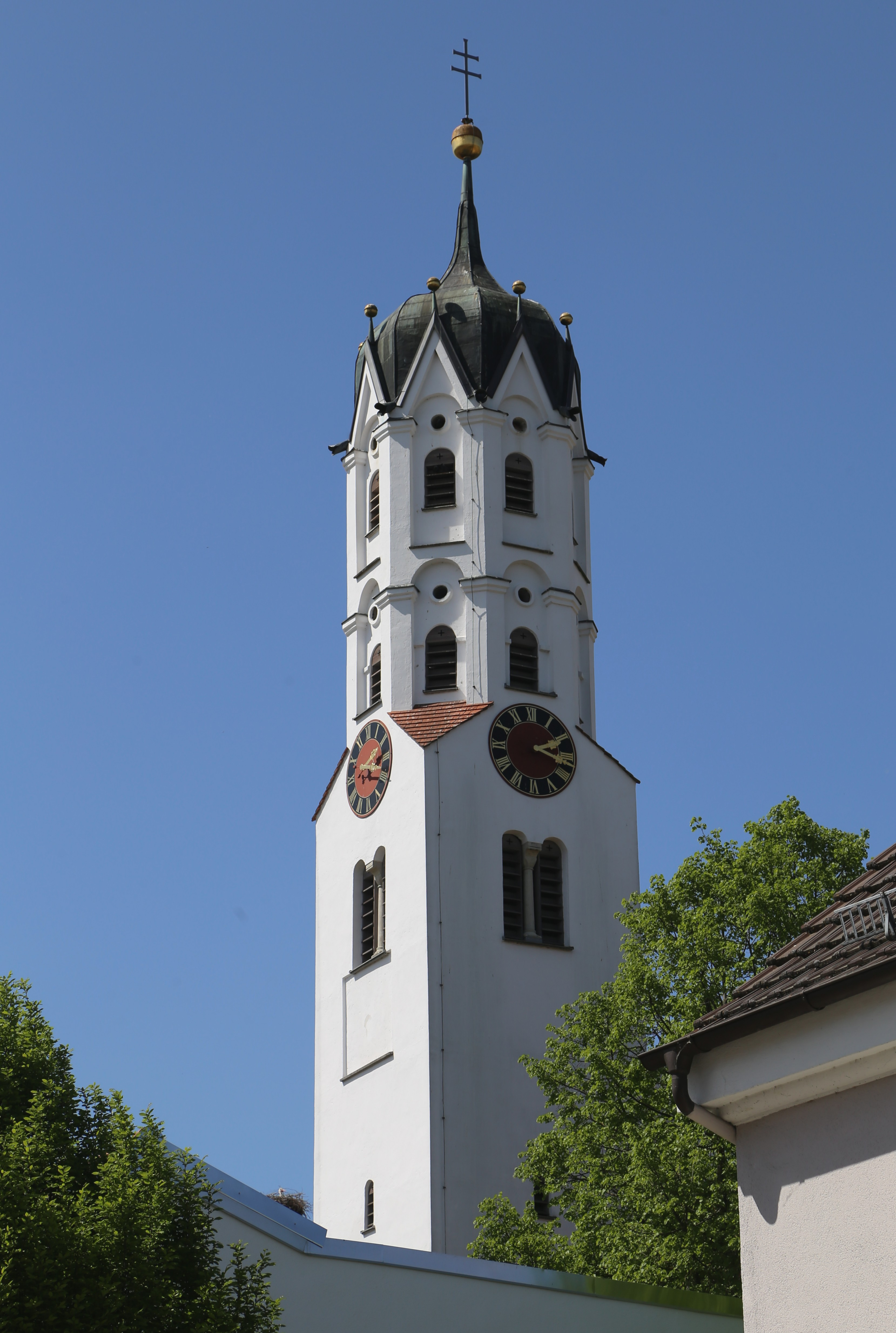 Augsburger Straße 1, Dinkelscherben; Katholische Pfarrkirche St. Anna, 1507 errichtet, Turm um 1580, Barockisierung 1717 und 1770; mit Ausstattung